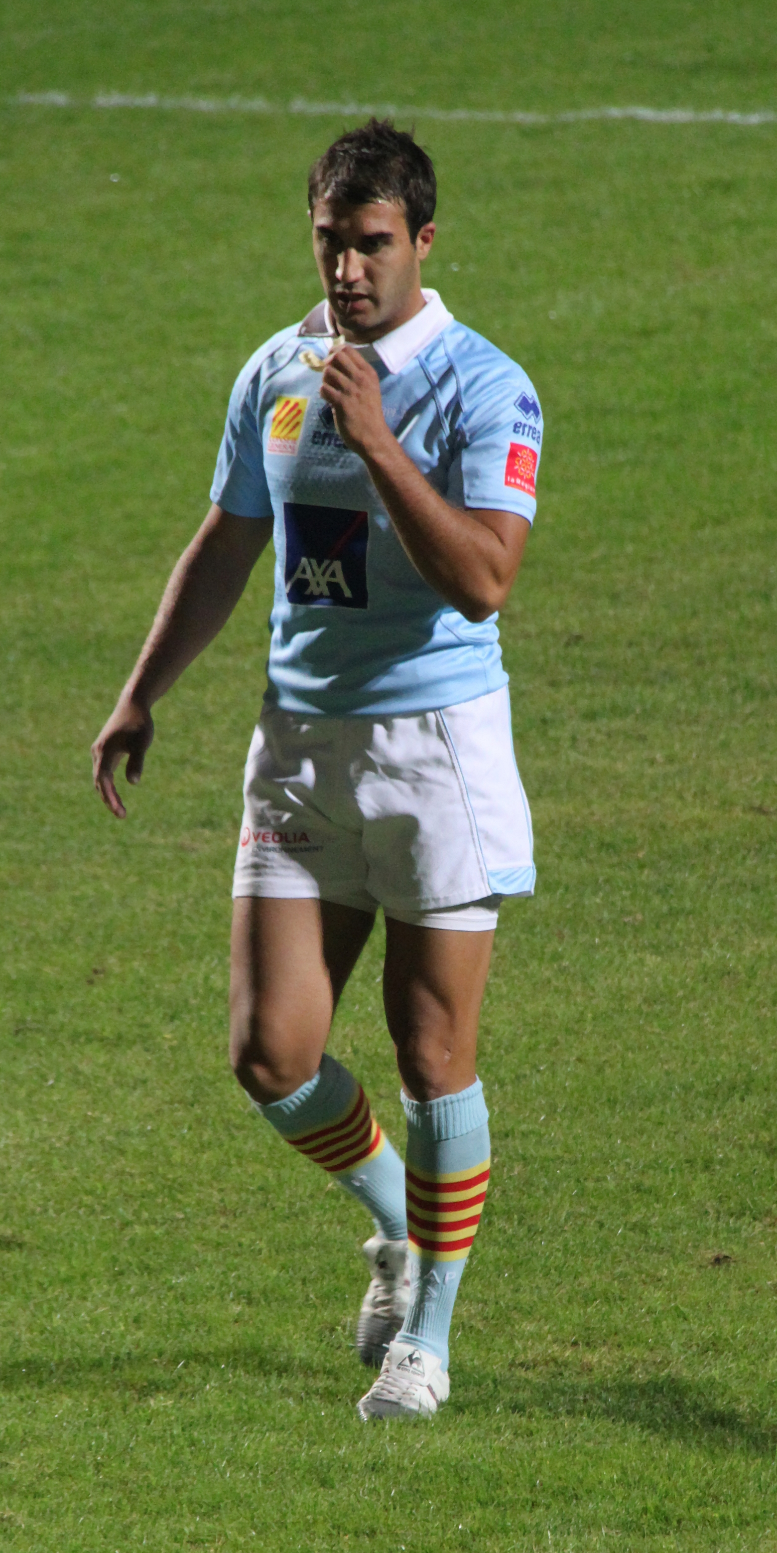 Usap Agen (2011-2012)